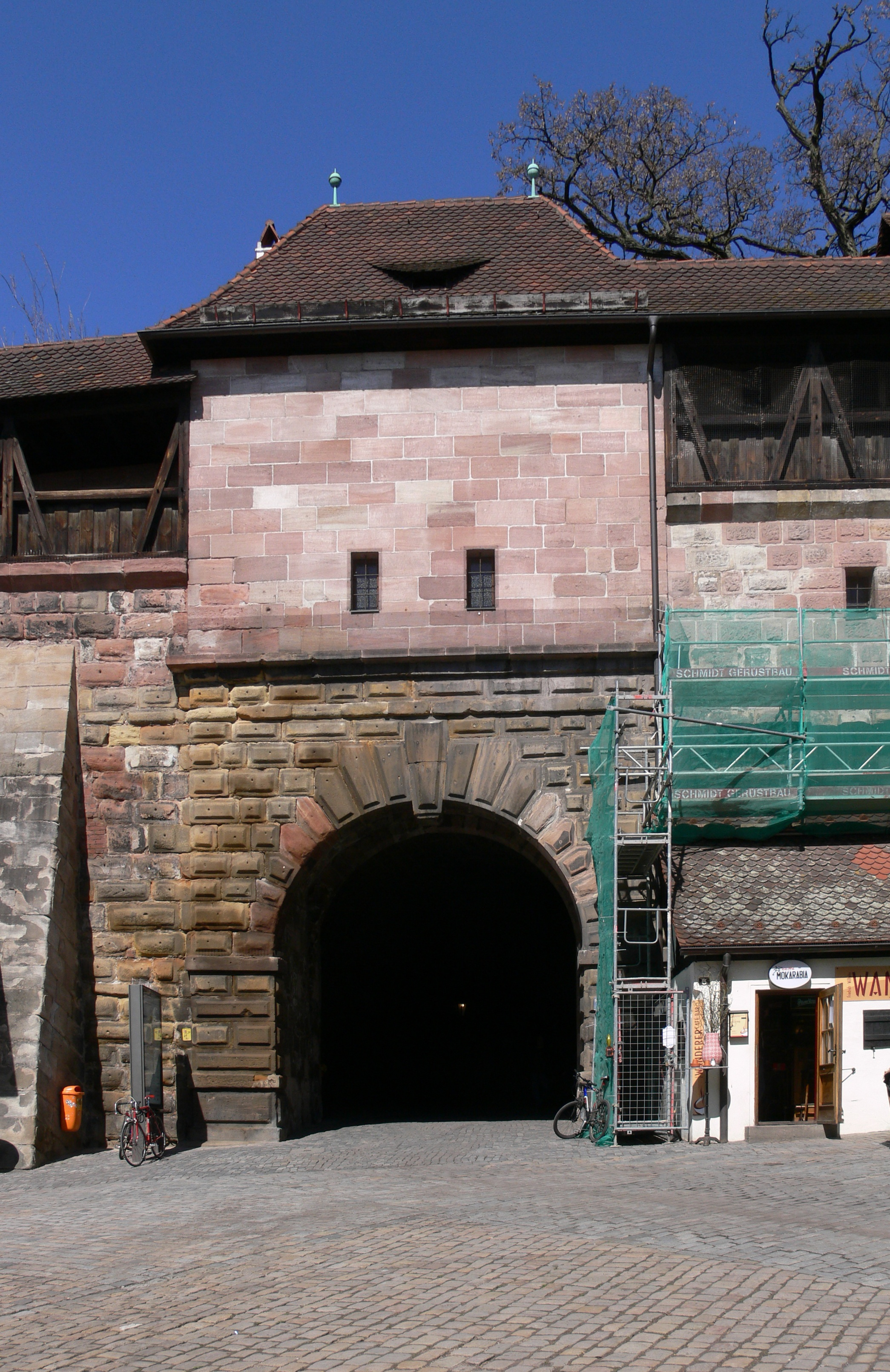 Nürnberg, Tiergärtnertor (links) mit Tiergärtnertorturm, rechts das Pilatushaus